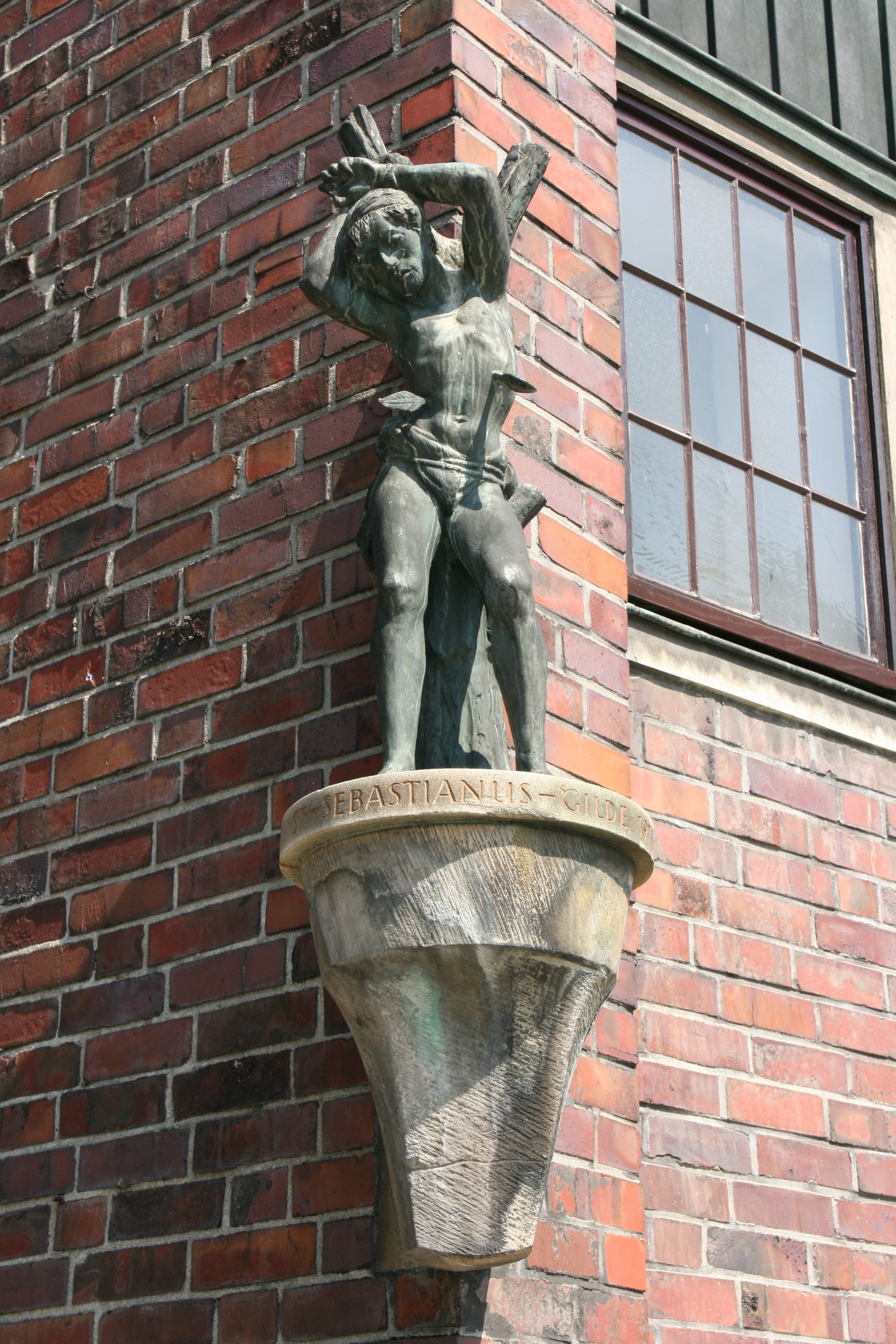 „Heiliger Sebastianus“ von Karl-Heinz Klein, St. Antonius am Marktplatz in Herten